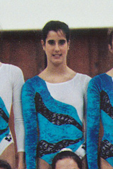 Cristina Chapuli en el Gimnasio Moscardó (Madrid) en 1991.